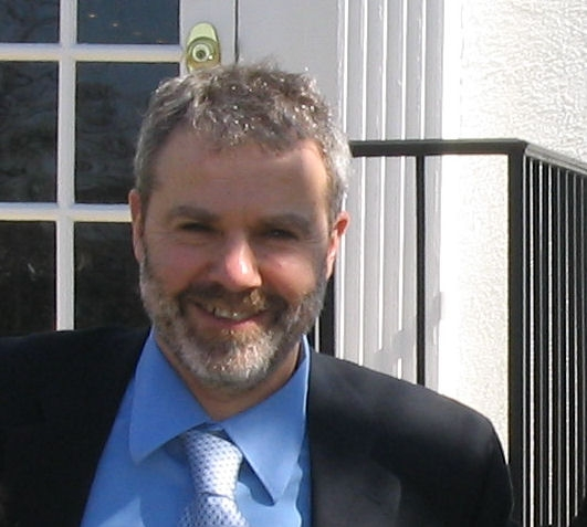 ד"ר עפר גרוזברד